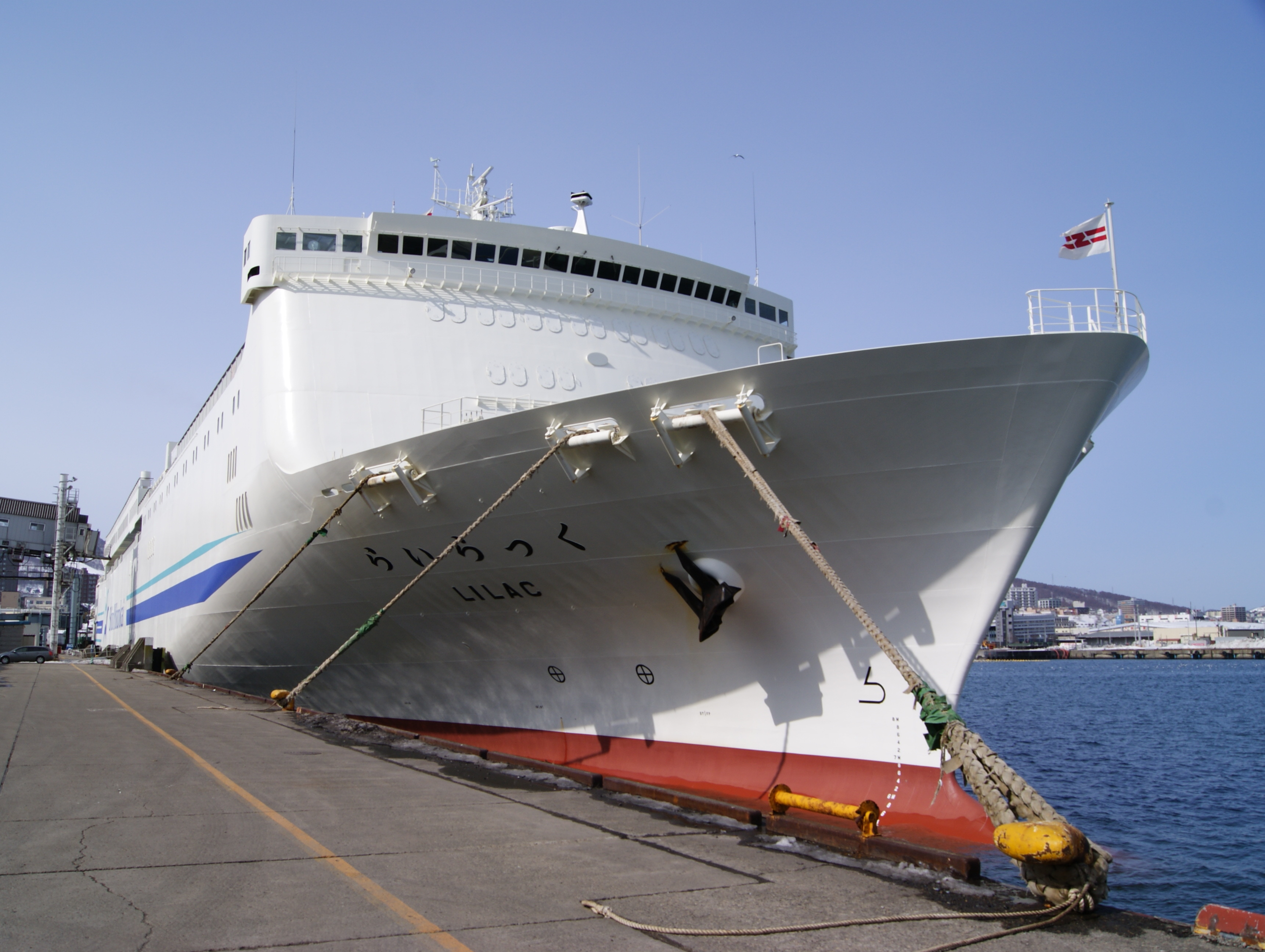 Otaru Port